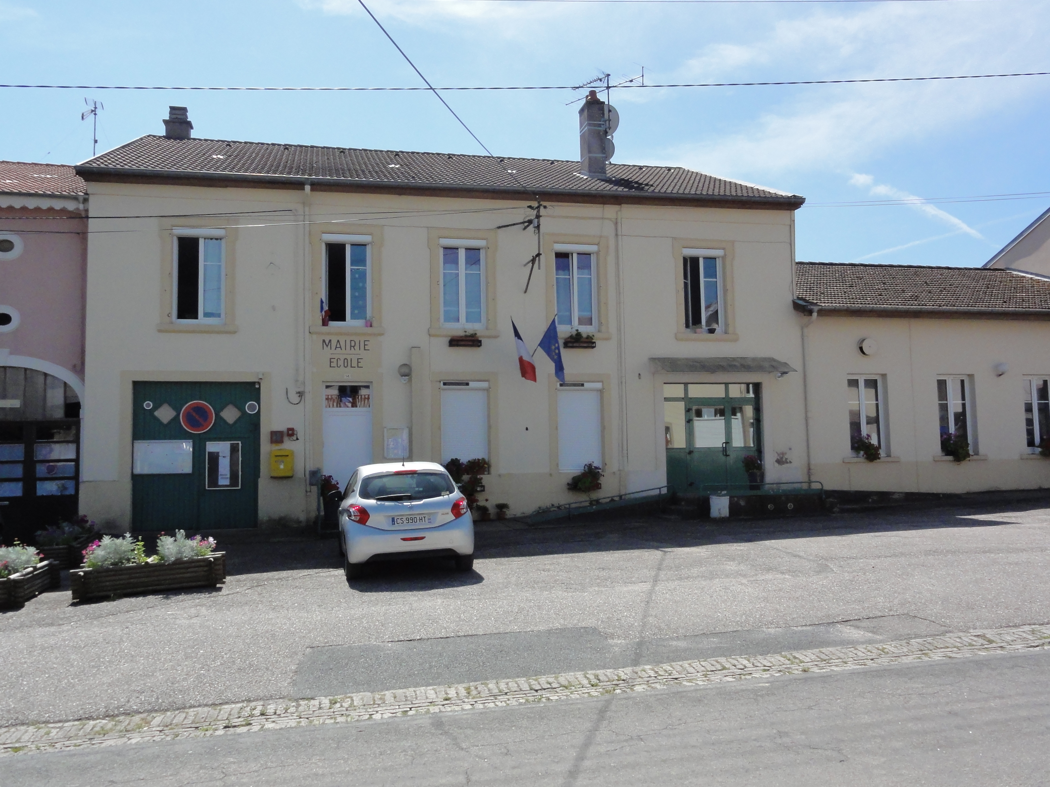 Hablainville (M-et-M) mairie